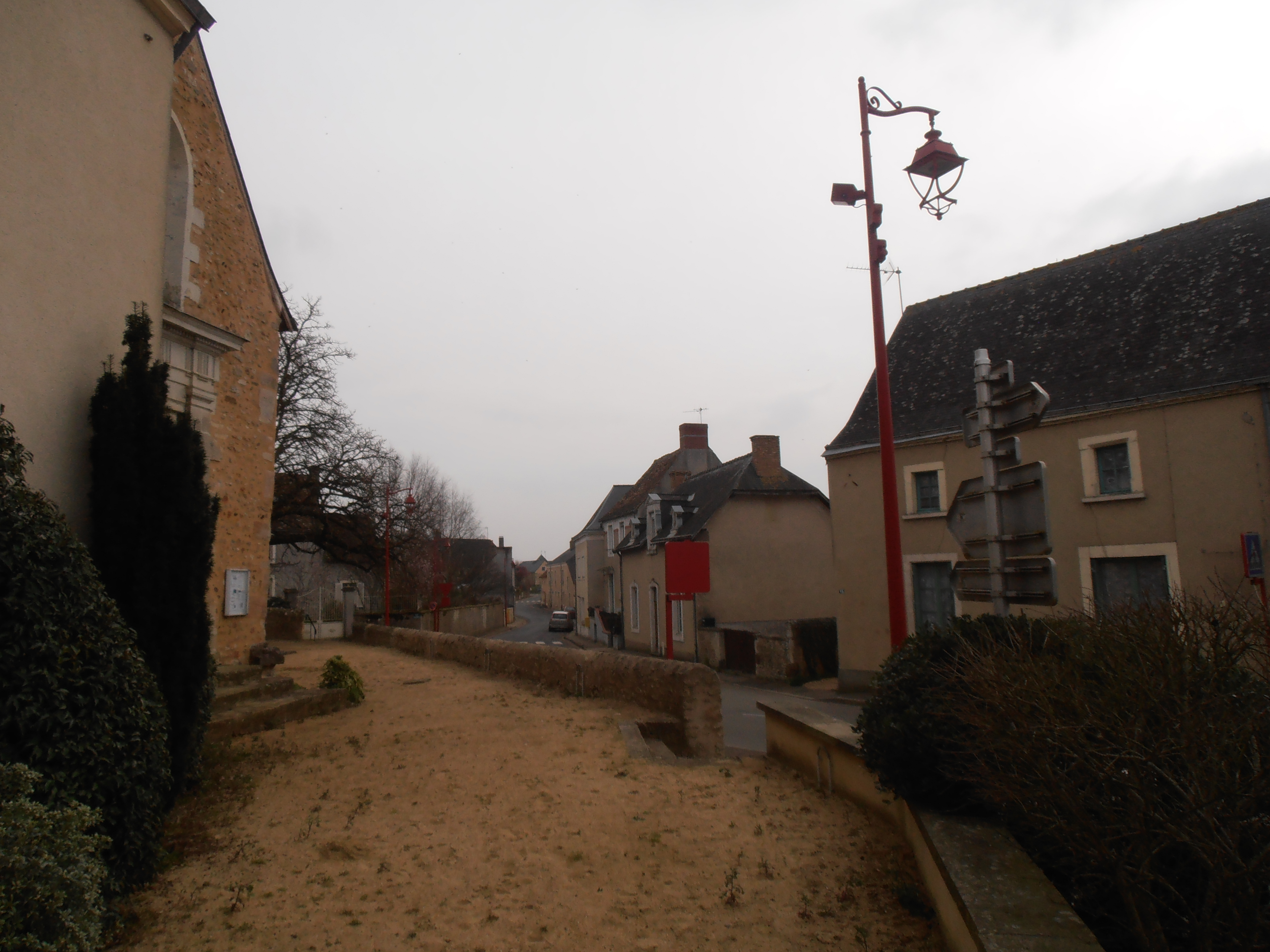 Le centre de Tassé vu depuis l'esplanade de l'église